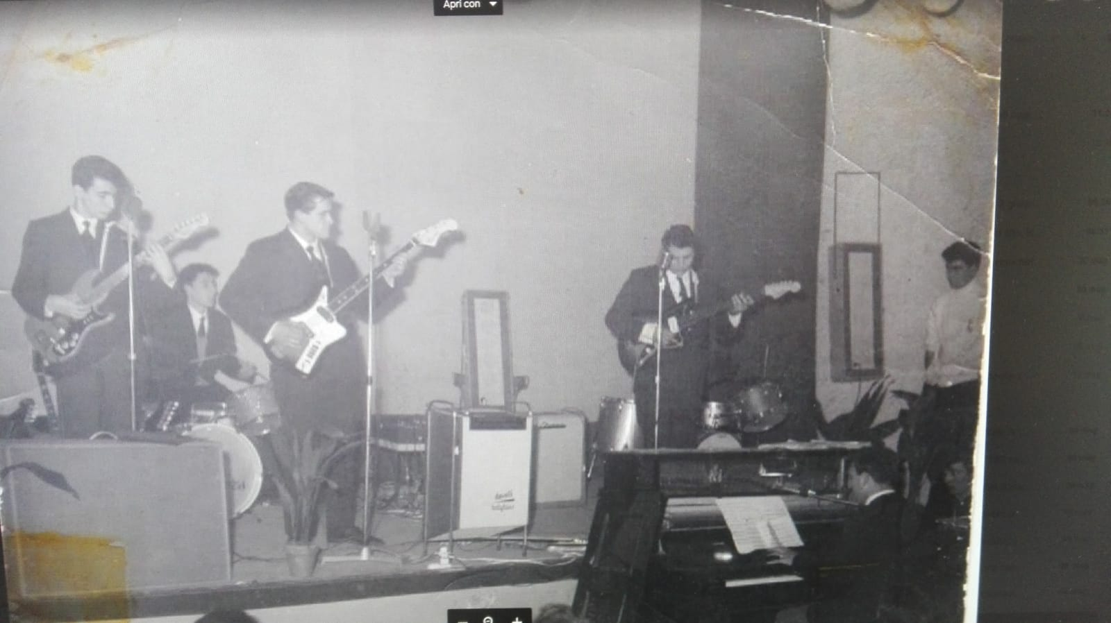 Con al basso Luciano Niccolai, questo è il primissimo nucleo dei Seminole